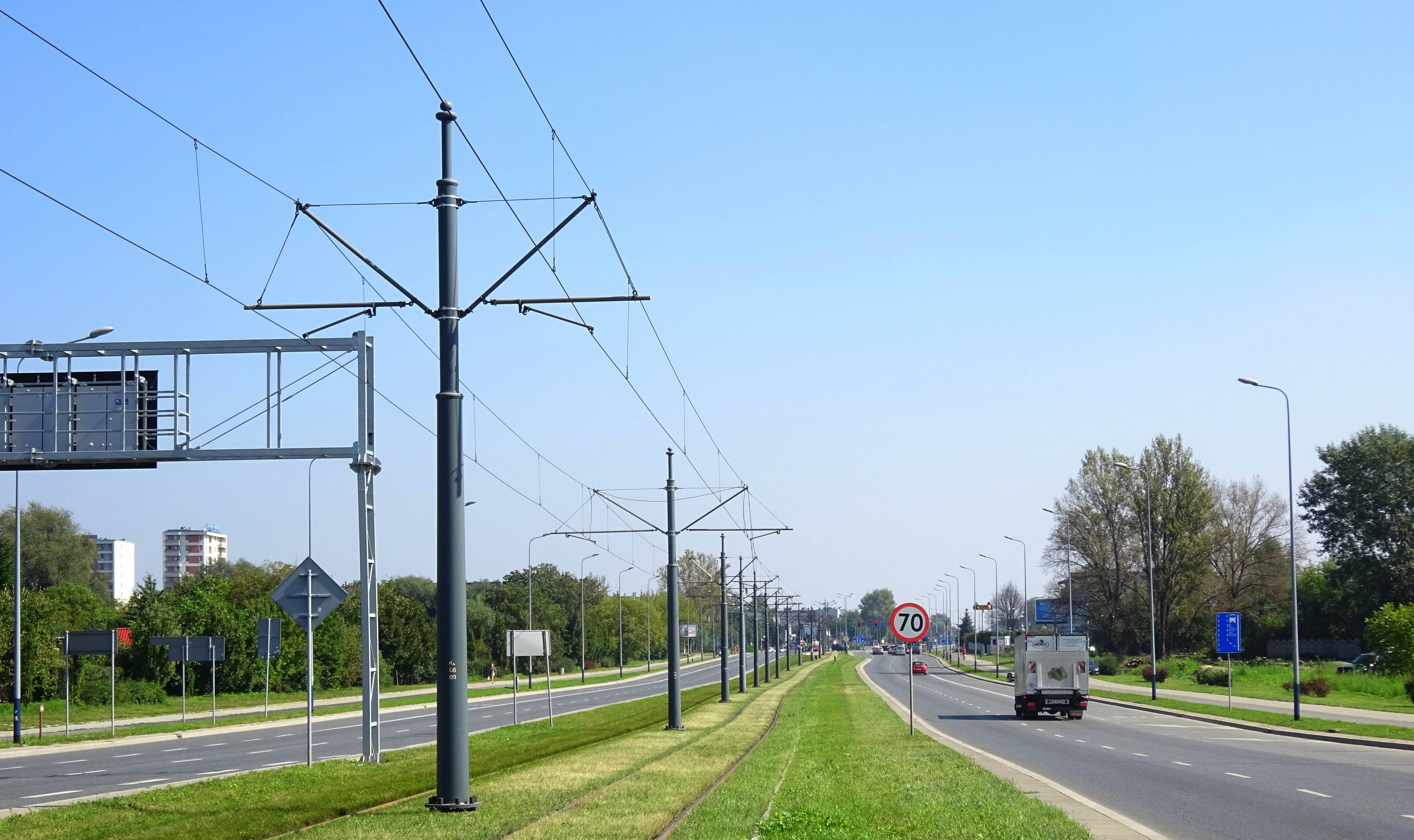 Ulica Lipska w Krakowie, widok na wschód, 2016.